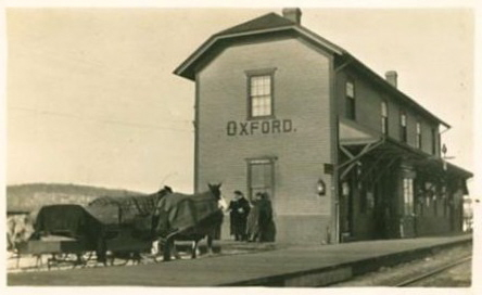 Gare du Grand Tronc, Oxford